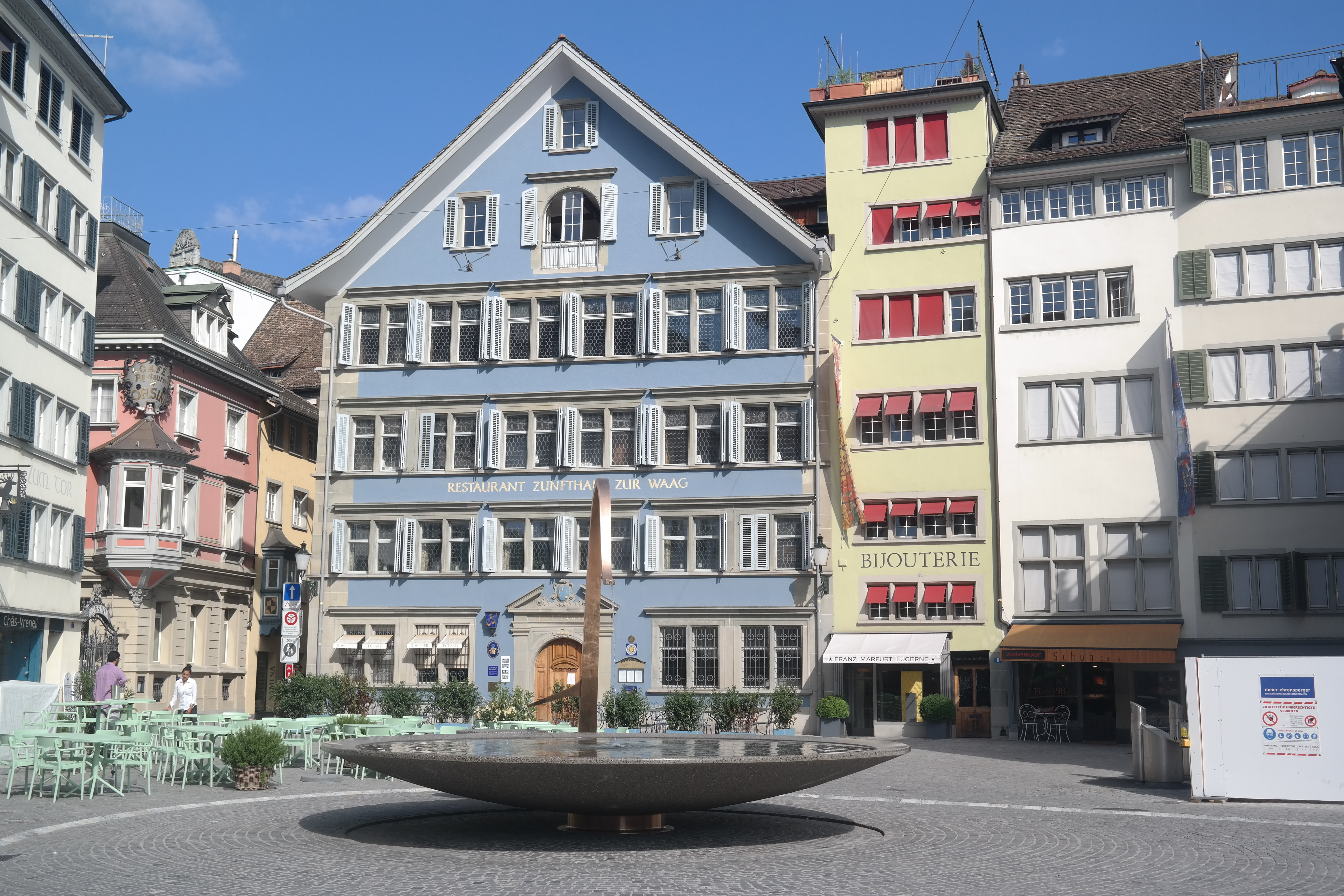 Das Zunfthaus zur Waag am Münsterplatz in Zürich, Sommer 2016